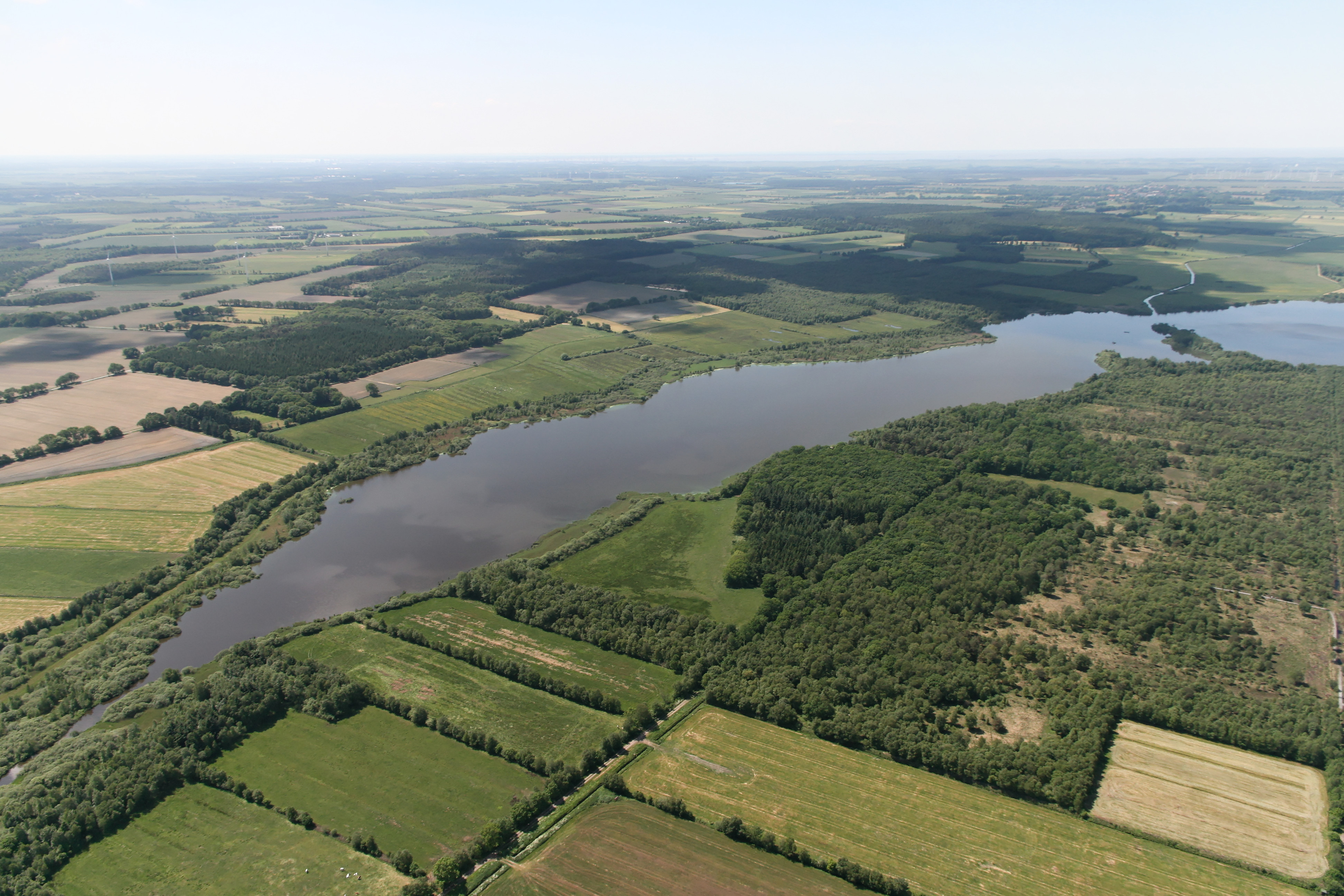 Halemer See